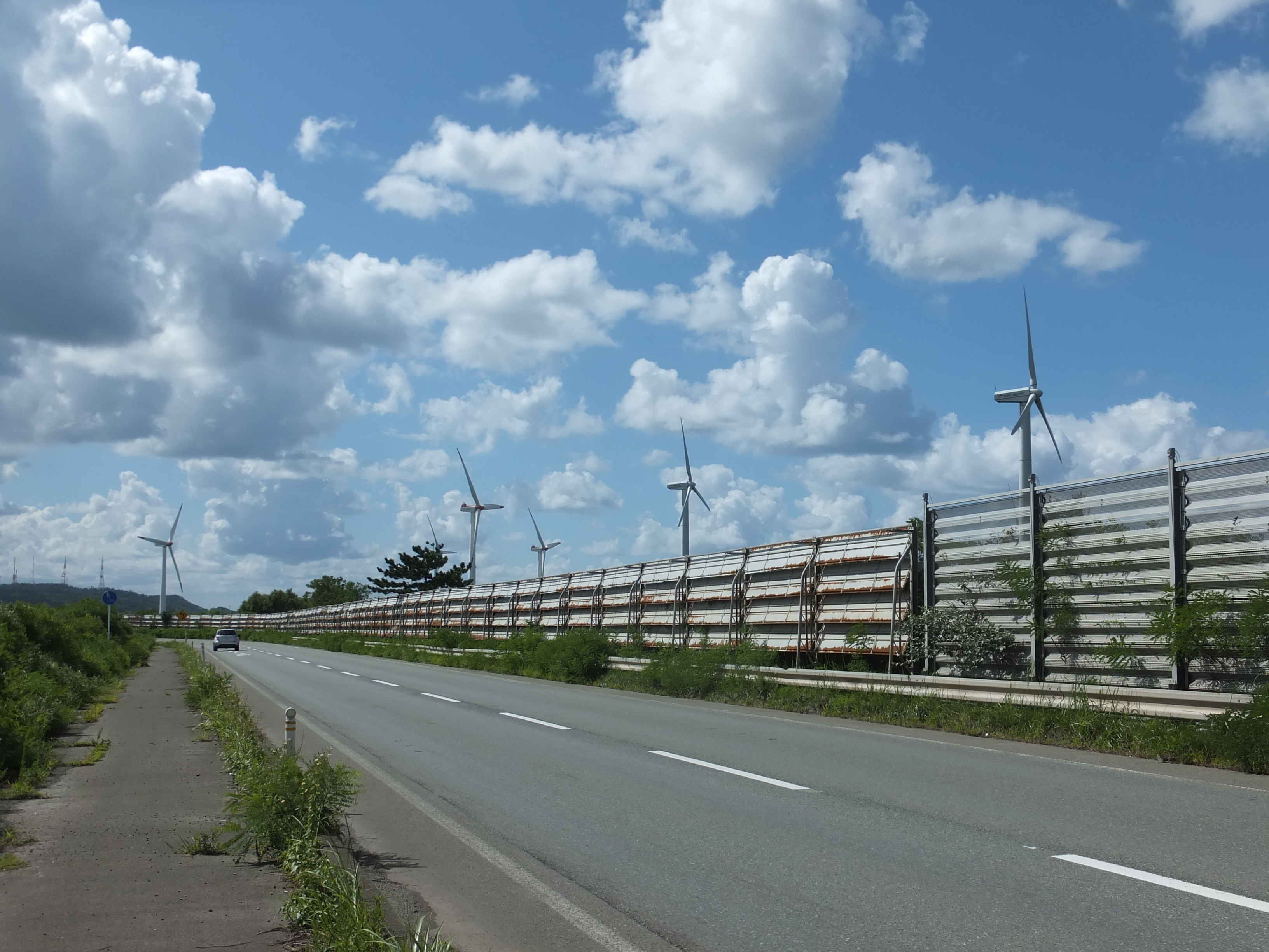 秋田市新屋の旧秋田空港跡地近くに建てられた風力発電所「秋田新屋ウィンドファーム」。秋田県道65号、はまなすロードより望む。